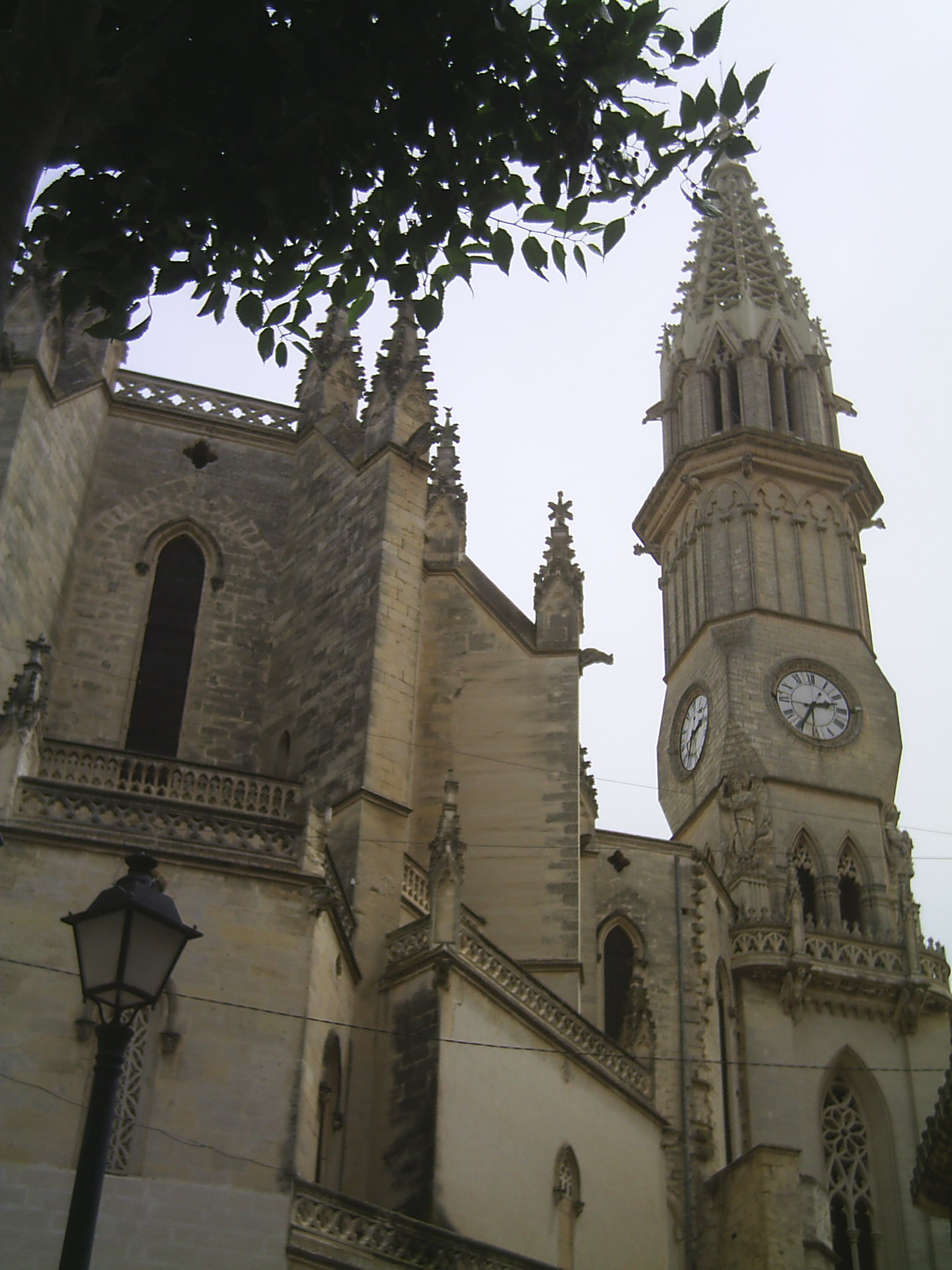 Contingut lliure